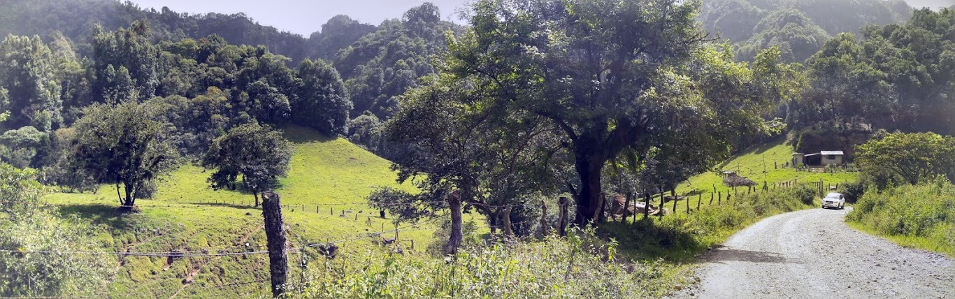 Un ejemplo de tantos caminos que se encuentran en la región